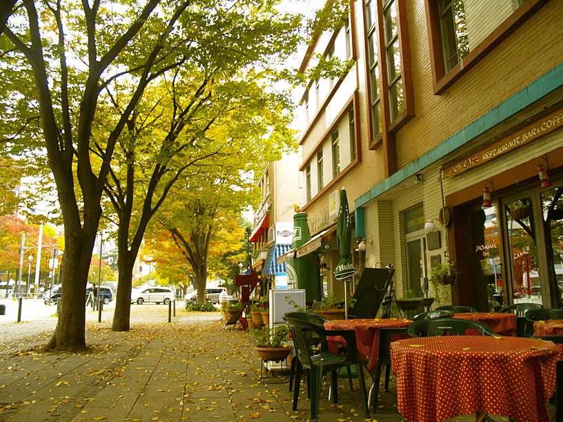 Fallen Leaves